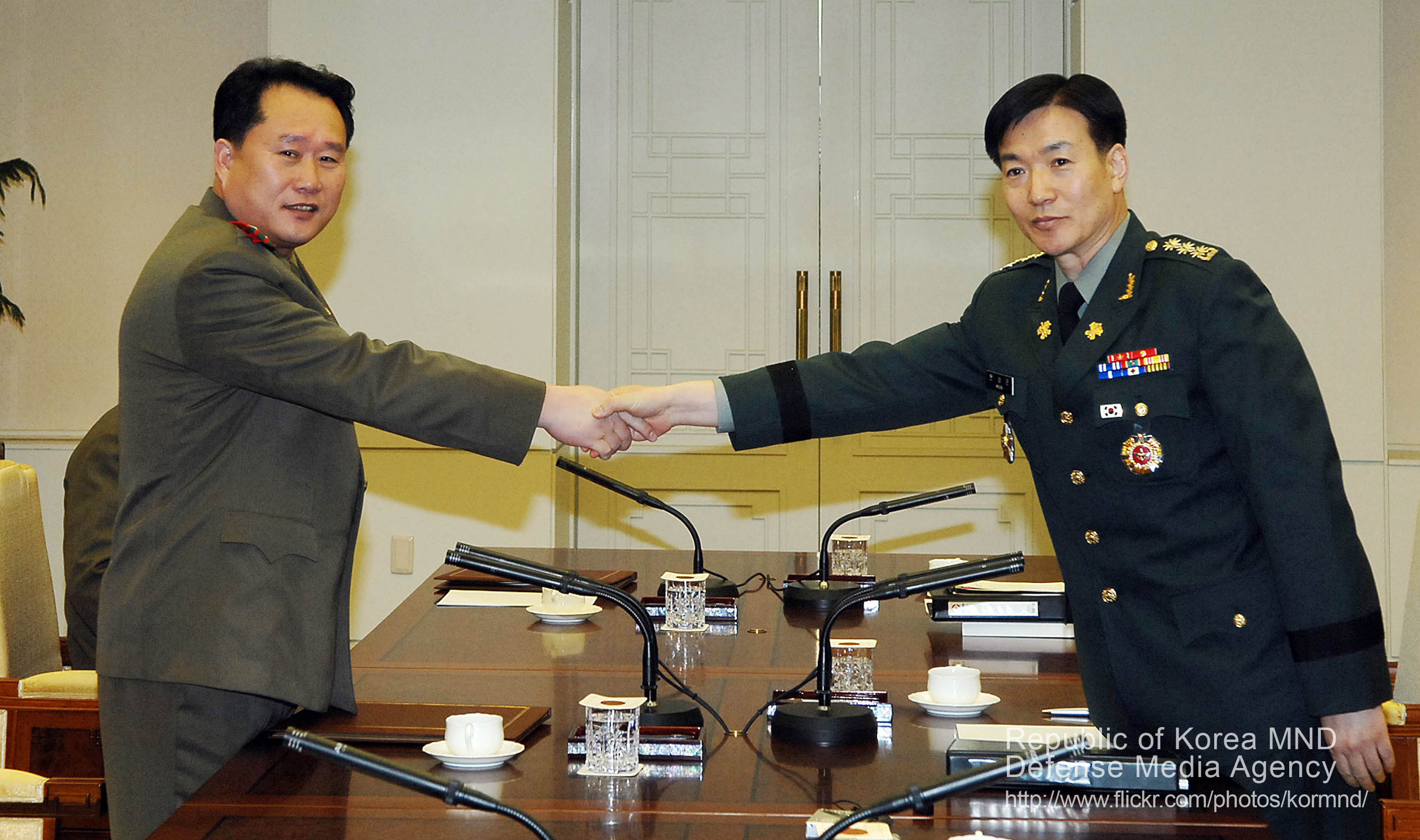 2011 국방화보 Rep. of Korea, Defense Photo Magazine 2월 8일 남북군사실무회담에서 우리측 대표 문상균(대령, 오른쪽) 국방부 북한정책과장과 리선권(대좌) 북측대표가 환담에 앞서 악수하고 있다.